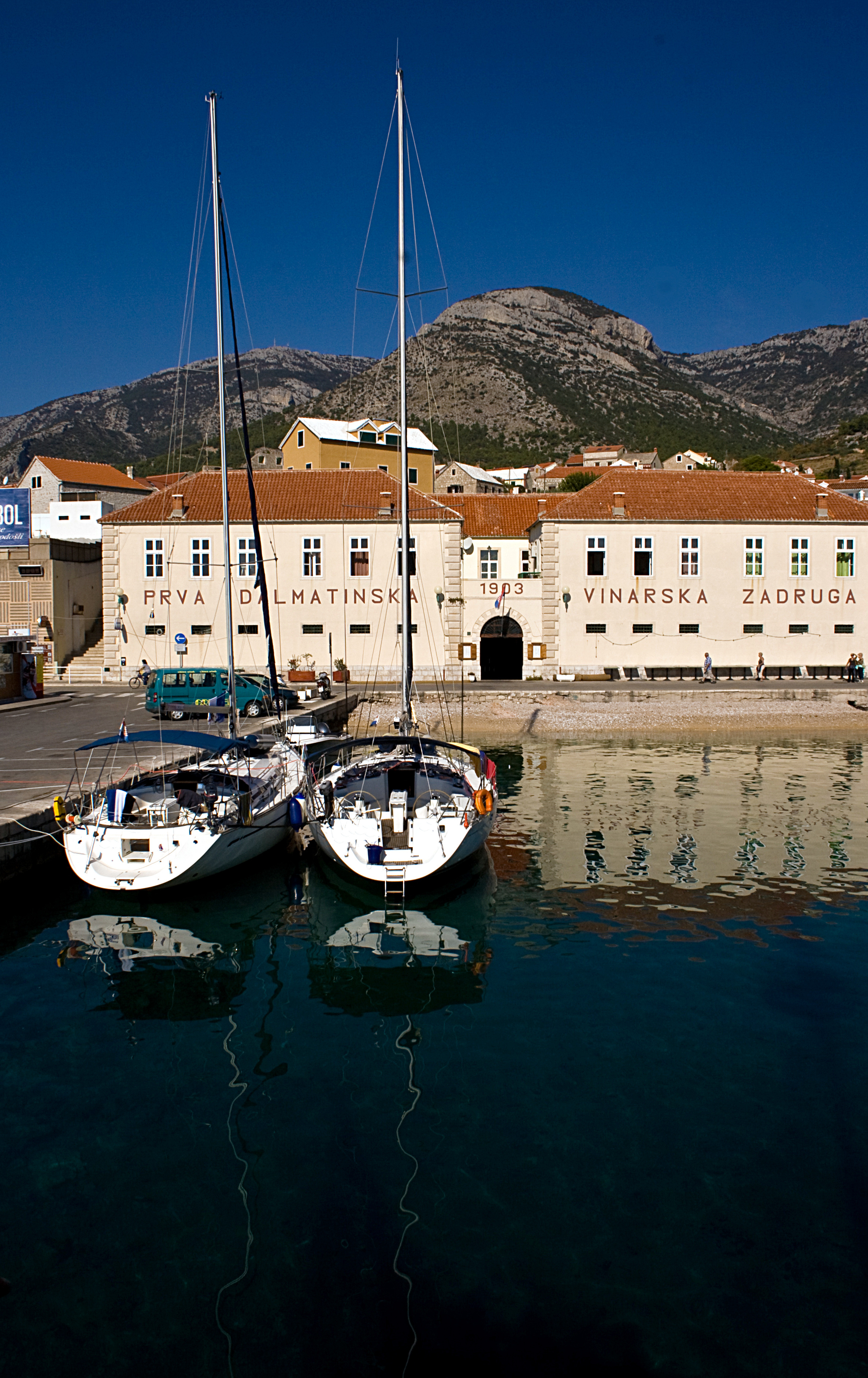 Insel Brač: Hafen Bol